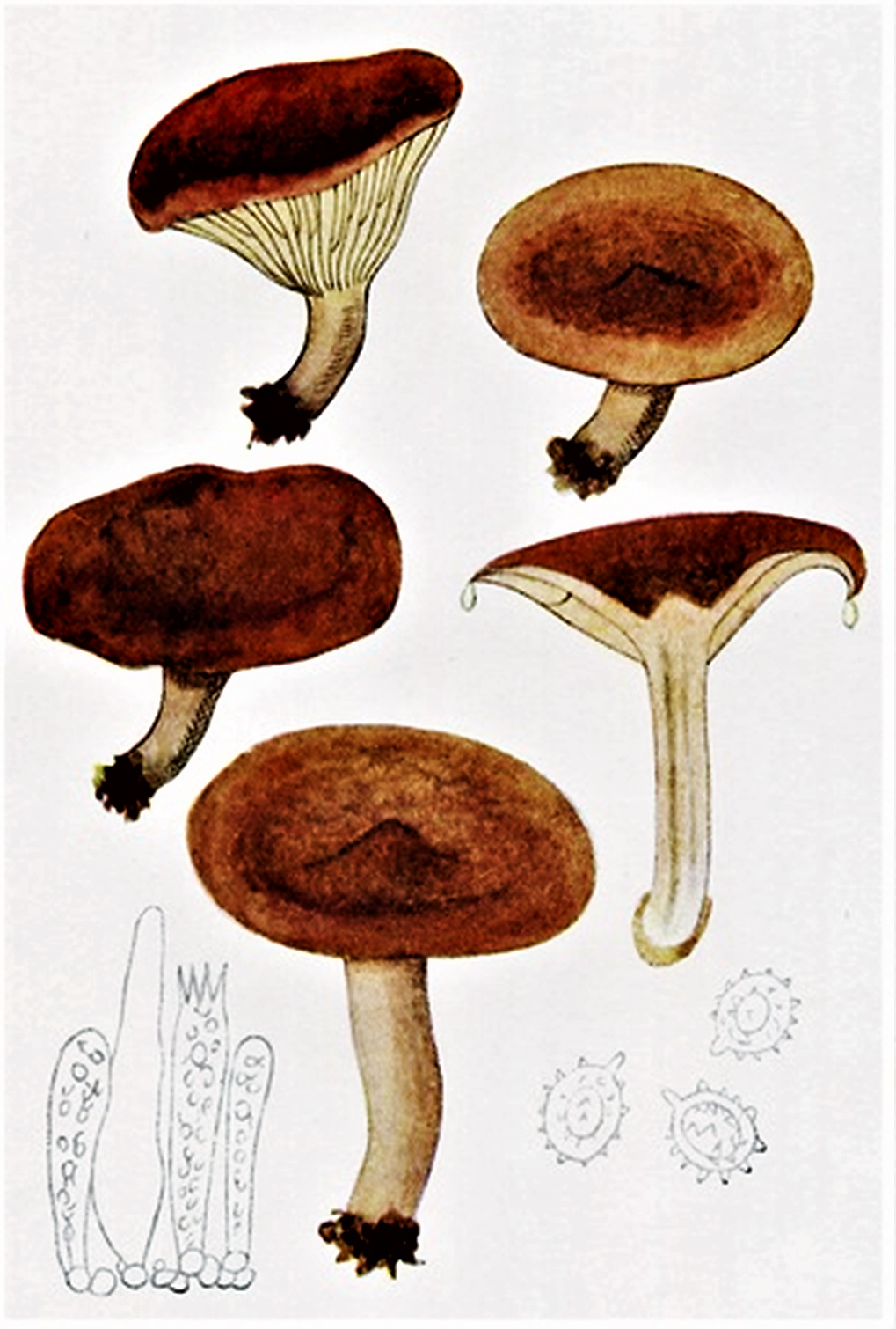 Giacomo Bresadola: Lactarius subdulcis (Pers., 1801) Gray (1821)